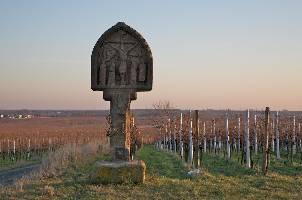 Schwarzes Kreuz Freinsheim, in Richtung Ungstein aus am Ortsrand stehend.